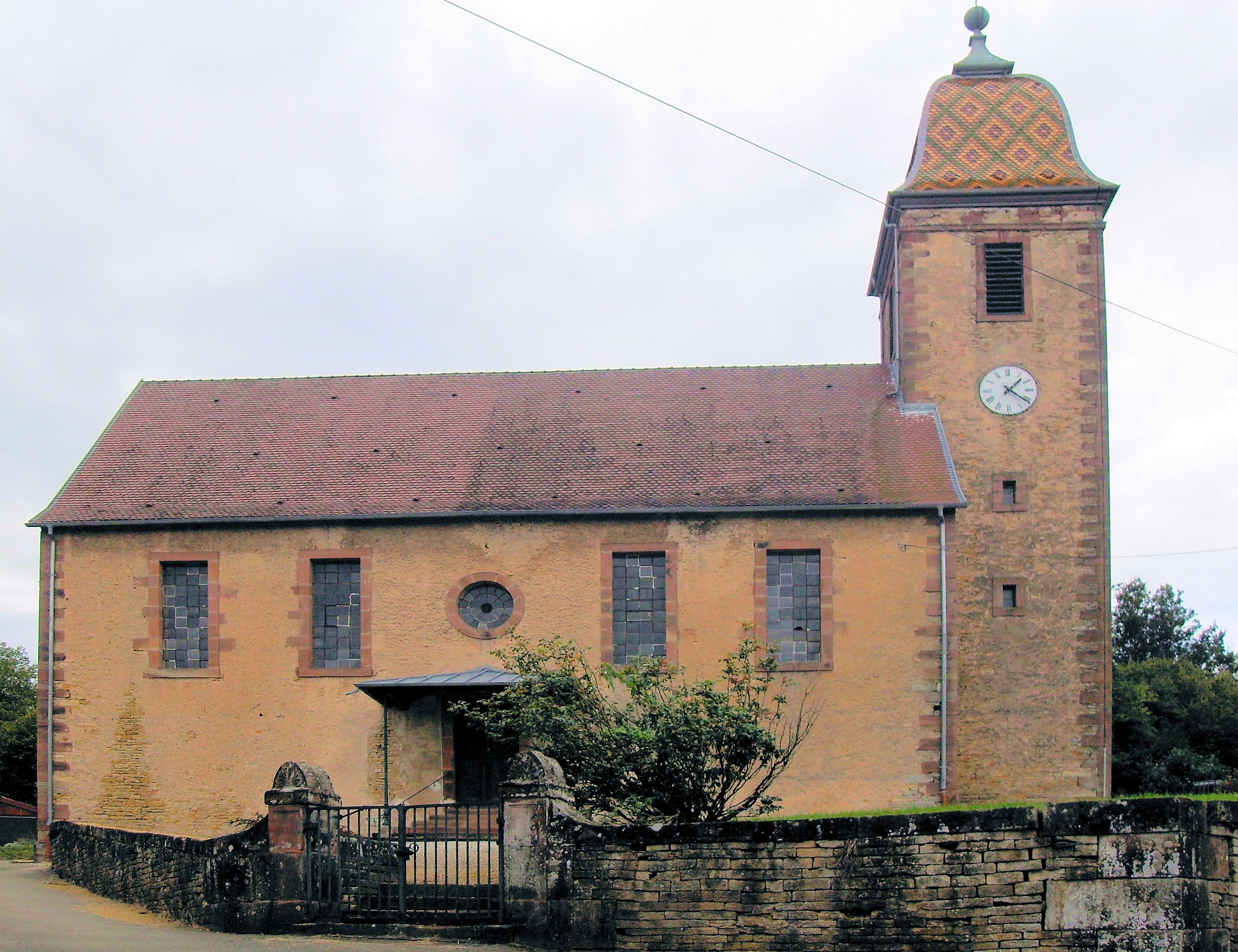 Le temple_protestant dAibre